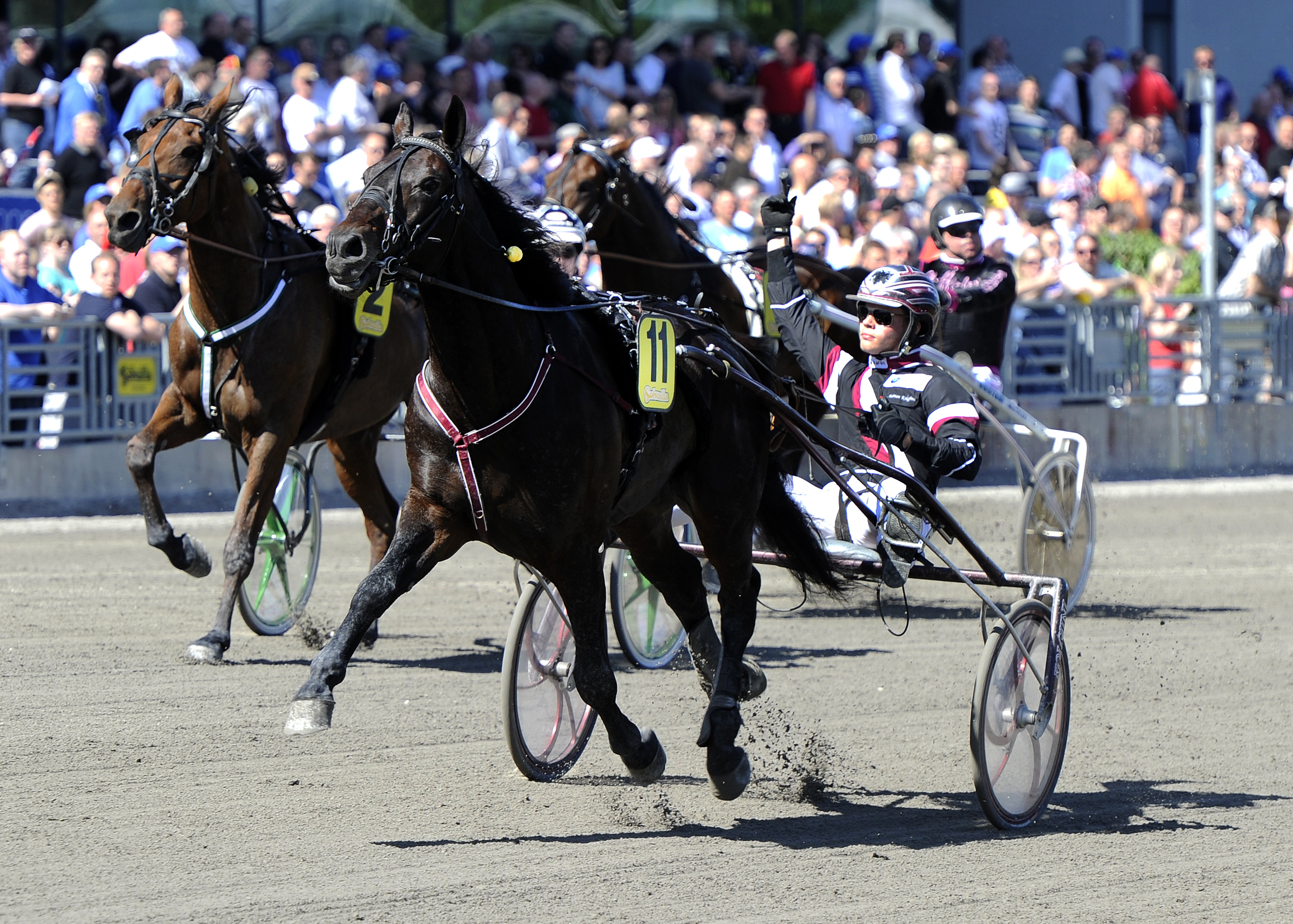 Nelson di Quattro och Adrian Kolgjini vann Cancerfondens lopp som inledde Elitloppssöndagen 2012.